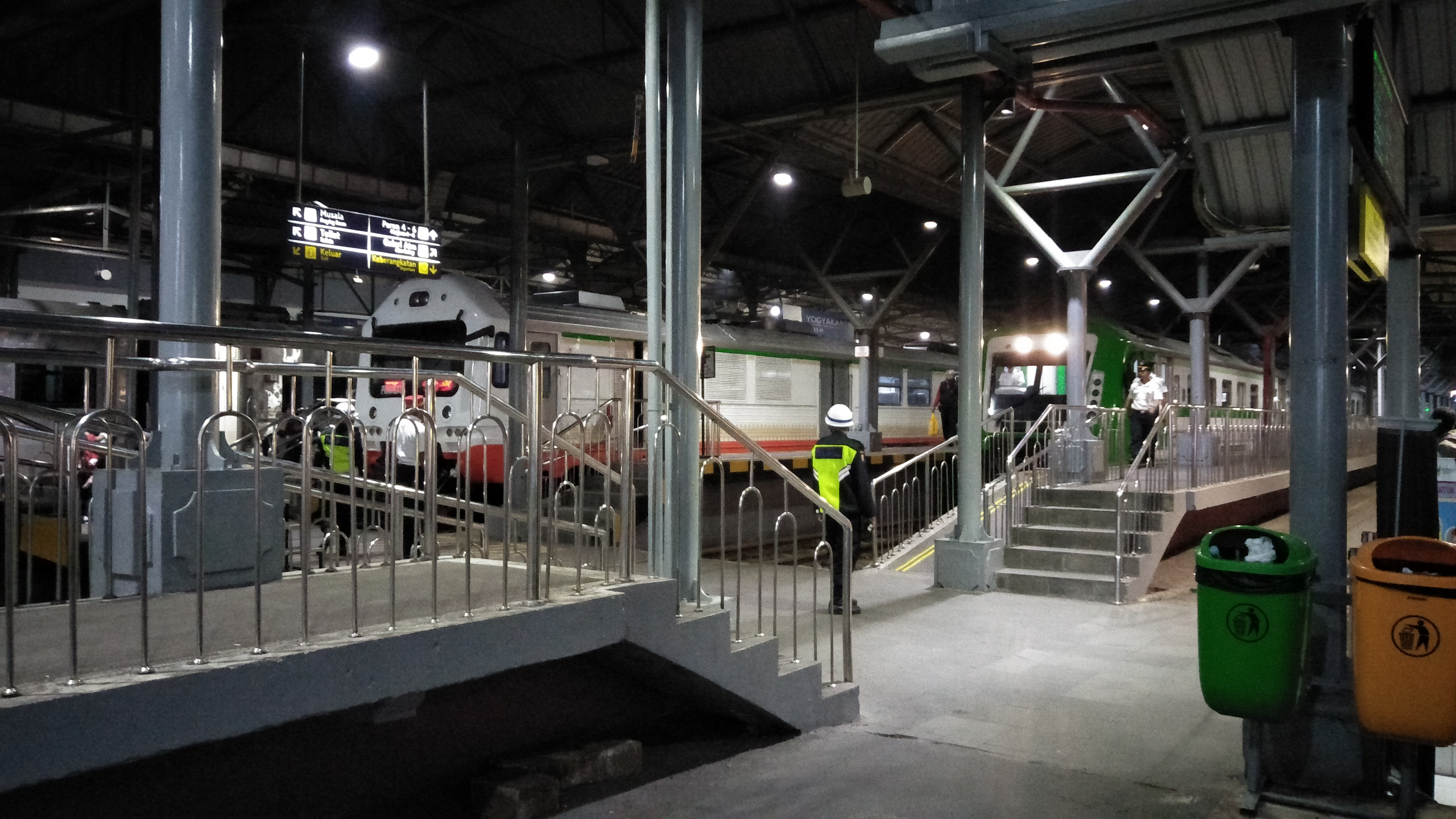 KA Prameks sedang berhenti di stasiun Yogyakarta